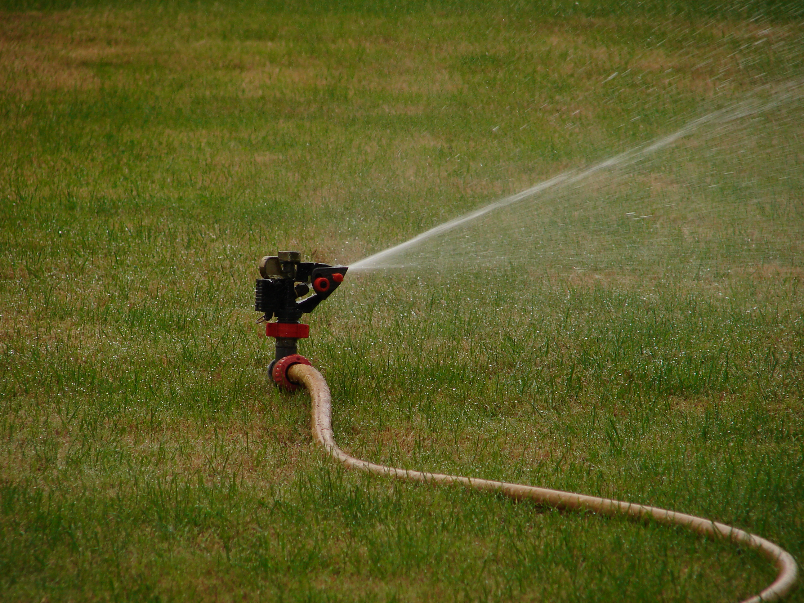 Un arroseur de jardin